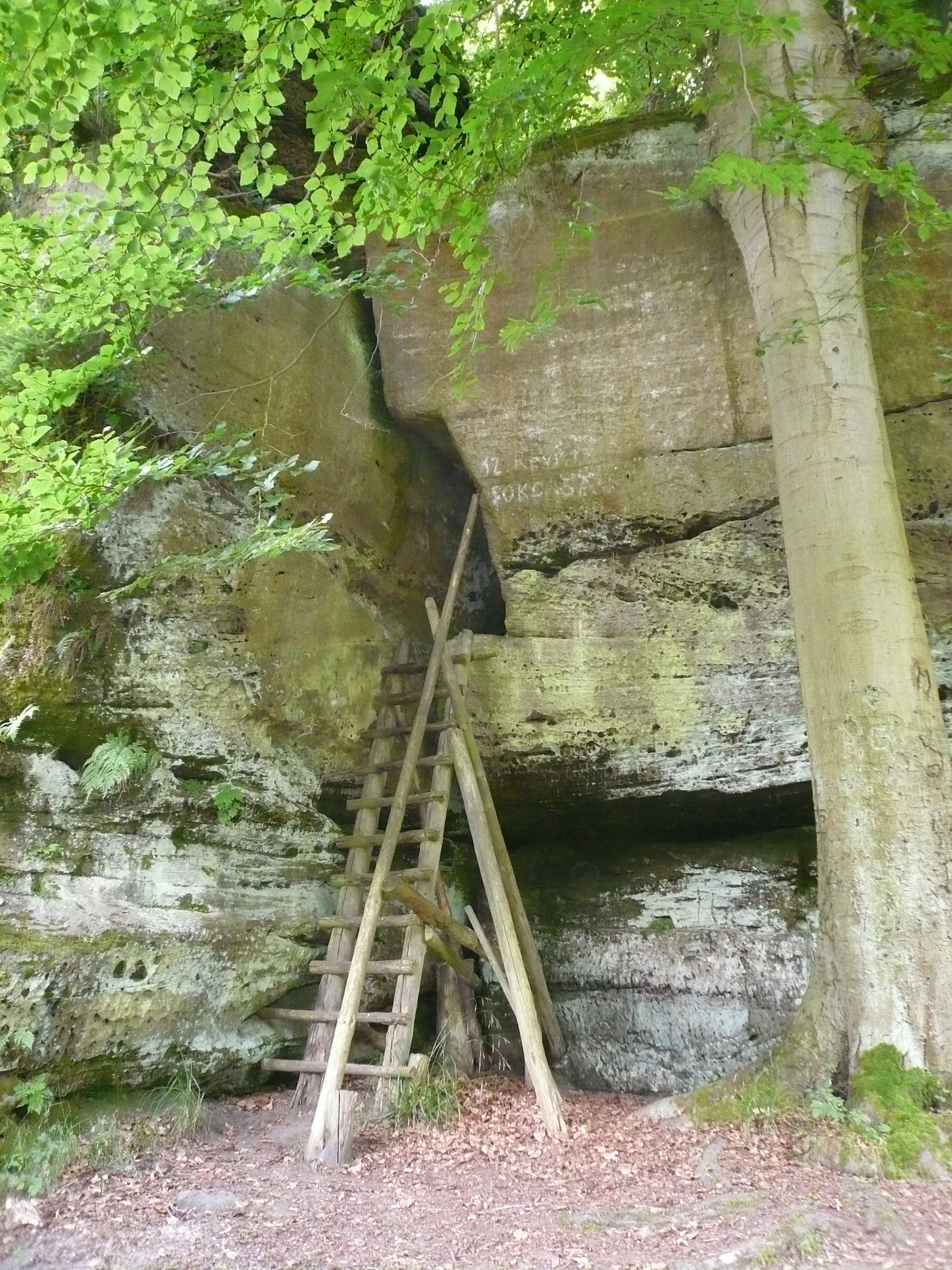 Hurkutstein im Reinhäuser Wald bei Reinhausen / Gemeinde Gleichen, Niedersachsen. Erweiterte Felsspalte im Buntsandstein, ehem. Einsiedelei des Mönchs Heinrich Hufnagel 1385. Naturdenkmal seit 1936